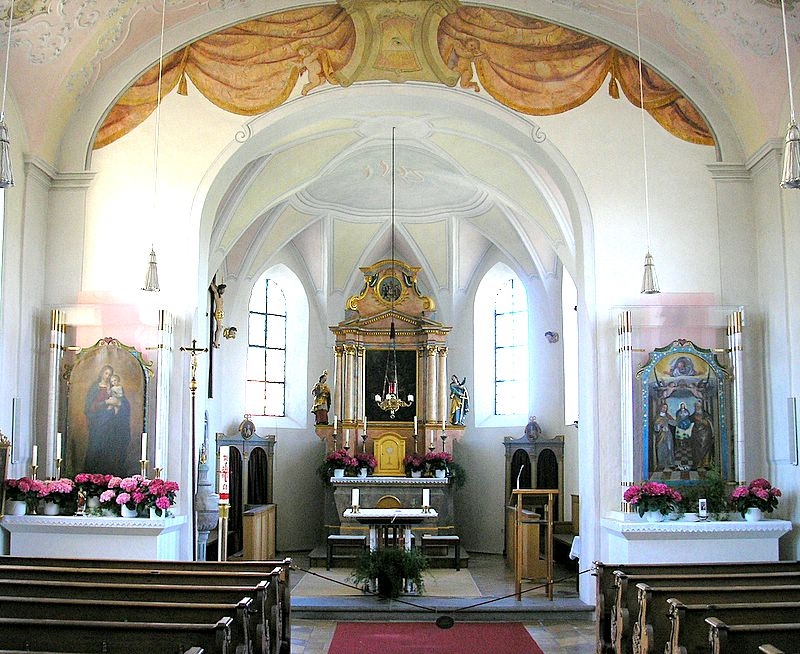 Bad Bayersoien (Landkreis Garmisch-Partenkirchen, Oberbayern). Pfarrkirche St. Georg. Innenraum nach Osten. Eigene Aufnahme, Mai 2007 / Bad Bayersoien (Upper Bavaria, Germany). Parish church of St George. Interior, looking east. Own photo, May 2007